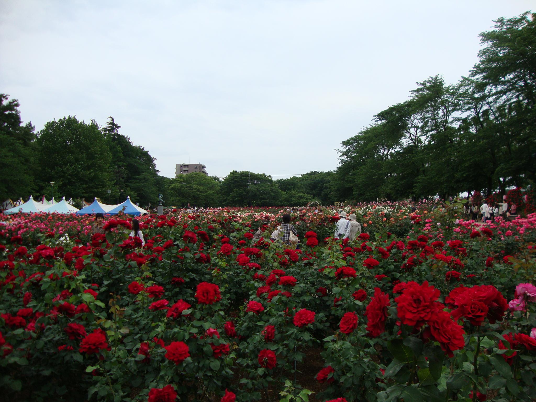 与野公園のバラ園（5月撮影）。